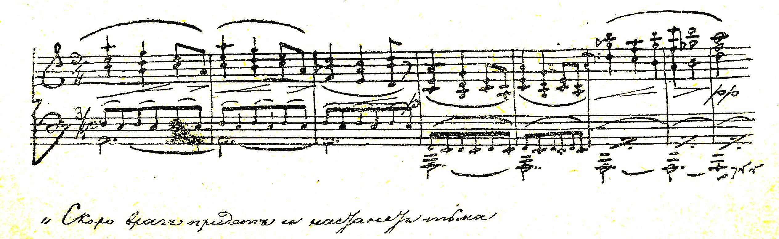 Отрывок из письма М. П. Мусоргского – В. В. Стасову. Под нотным станом: «Скоро враг придёт, и настанет тьма» (отрывок из арии юродивого, из оперы «Борис Годунов»).